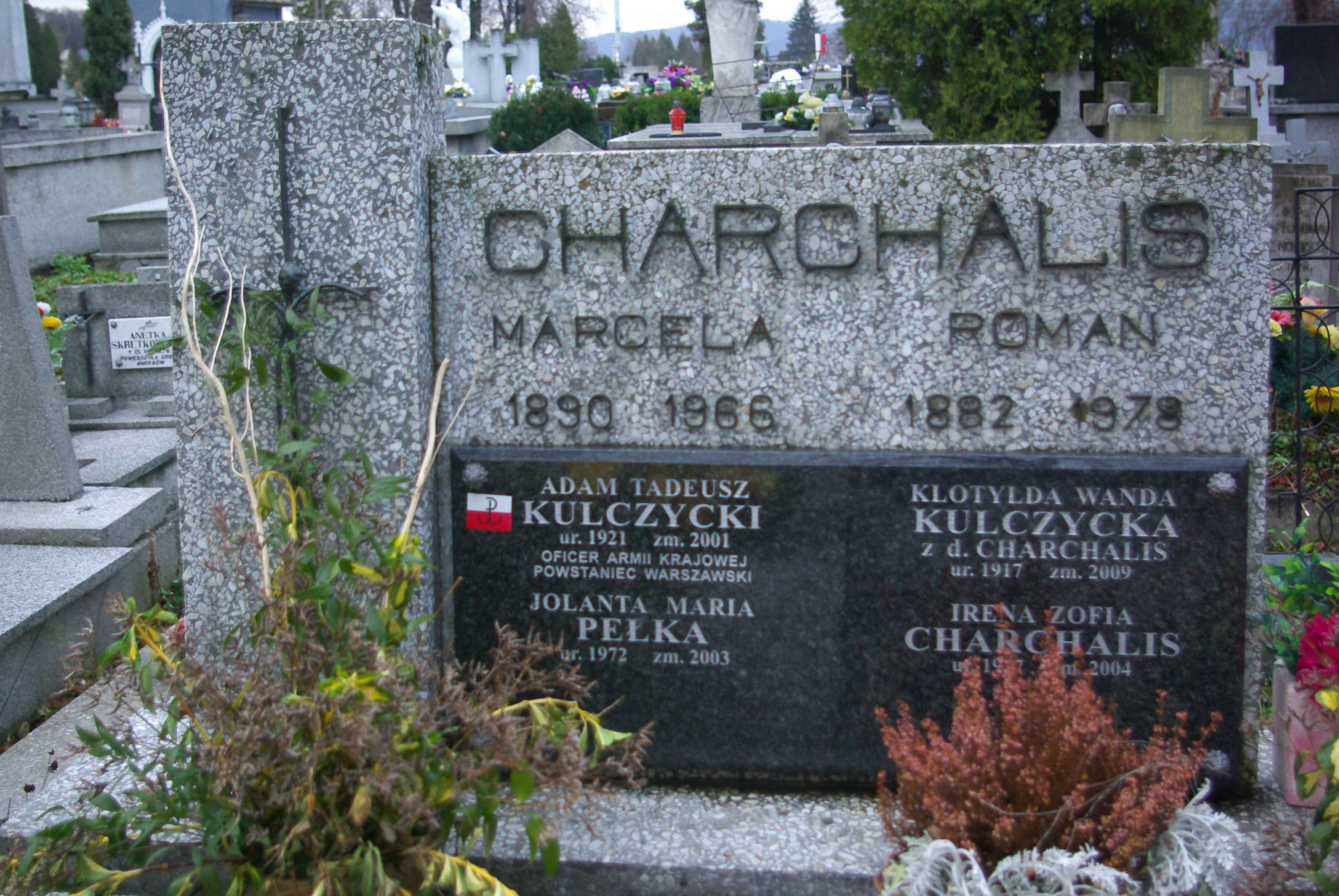 Grobowiec rodziny Kulczyckich na Cmentarzu Centralnym w Sanoku. Pochowany Adam Kulczycki, powstaniec warszawski.